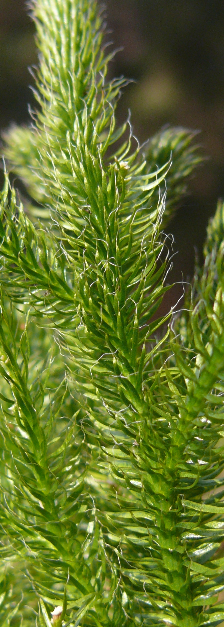 Lycopodium clavatum, Schwäbisch-Fränkische Waldberge, Germany